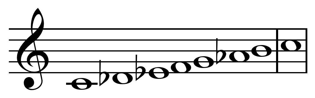 Neapolitan minor scale on C